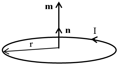 Магнитен диполен момент; © Милко Куйлеков